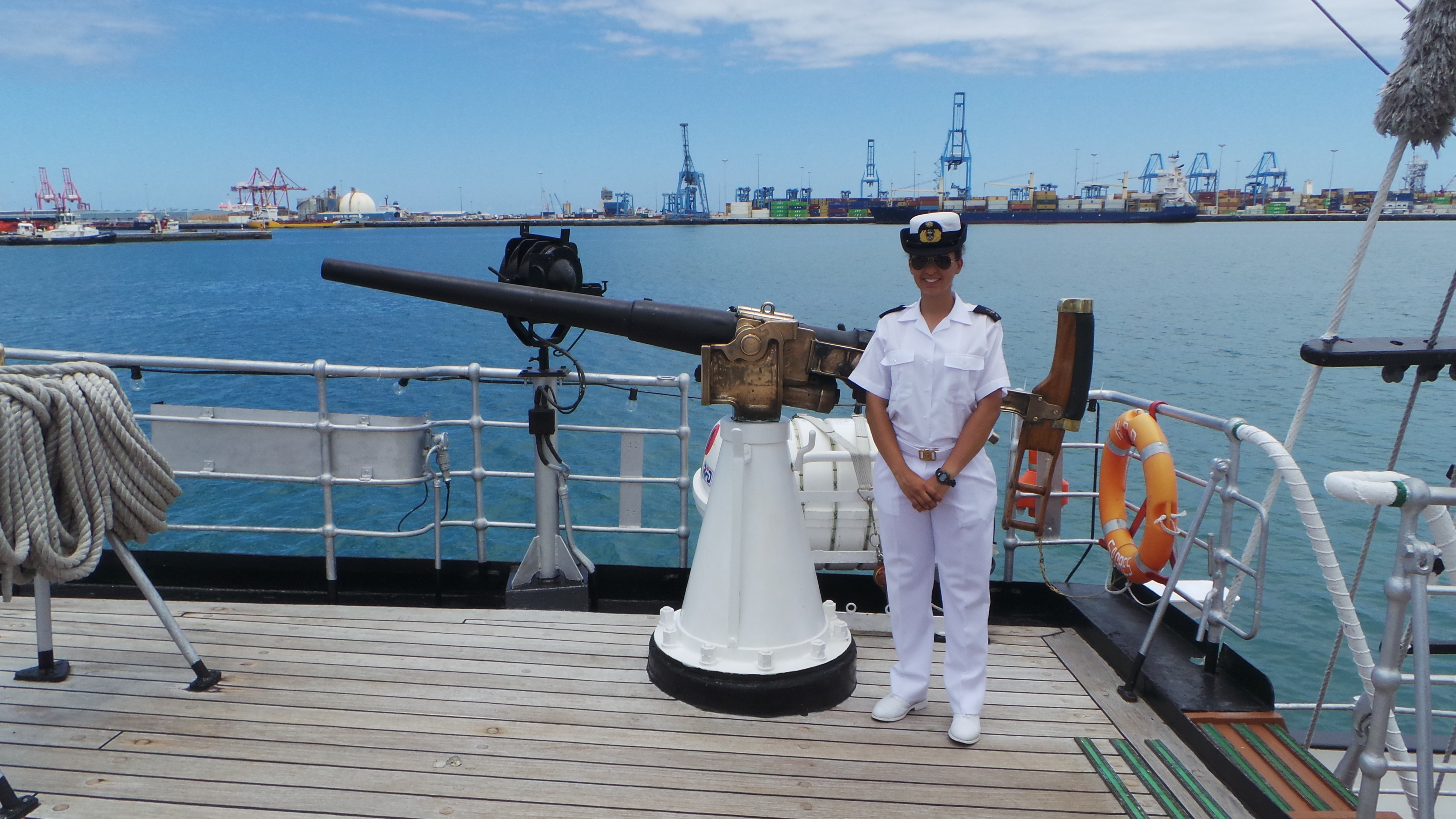 Visita al Buque Escuela NRP Sagres, en La Base Naval de Las Palmas de Gran Canaria. Este fin de semana de semana ( 20, 21 y 22 de junio de 2014) tenemos la oportunidad de disfrutar, en Las Palmas de Gran Canaria, de la visita del buque escuela portugués NRP Sagres, se encuentra atracado en el muelle de la base naval y podrá ser visitado hoy viernes hasta las 19h y mañana sábado de 10 a 12h y de 14 a 19h . El Buque proveniente de Lisboa partirá el domingo hasta Las Azores , para luego regresar a Lisboa, cuenta con unos 60 guardiamarines, con una decena de mujeres entre ellos, que realizan su periodo de instruccion Construido en 1937 en Hamburgo y tras varios avatares, fue adquirido en 1961 por la marina Portuguesa para sustituir al Sagres II, entrando en servicio como Sagres III en febrero de 1962. Tiene 89,5 metros de eslora, 12 de manga y 5,5 de calado, siendo su altura máxima de 45,5 metros. Cuenta además con 1.971 metros cuadrados de vela y desplaza 1.893 toneladas. La figura del mascarón de proa del Sagres III es el Infante D. Henrique nacido el 4 de marzo de 1394, siendo uno de los impulsores de la expansión y descubrimientos portugueses de la época. Más información del Buque : Web del Buque